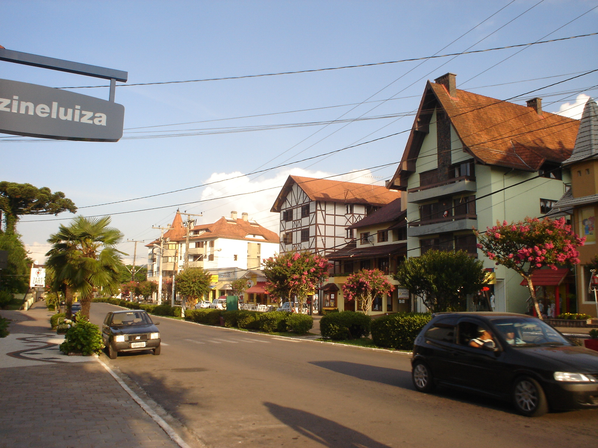 Avenida XV de Novembro - Principal avenida da cidade.